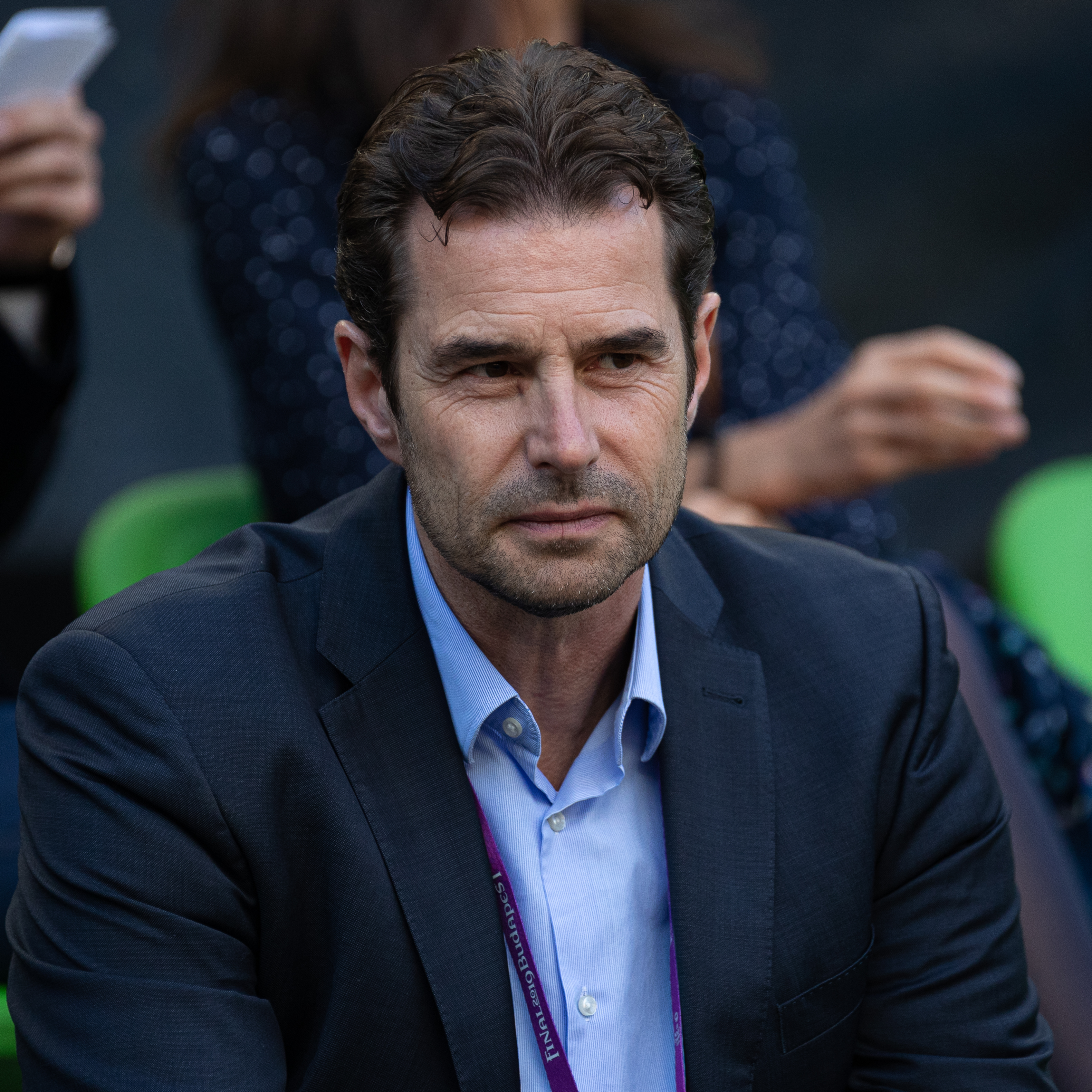 Fußball, Frauen, UEFA Women's Champions League, Olympique Lyonnais - FC Barcelona; Ralf Kellermann, sportlicher Leiter des VfL Wolfsburg, auf der Zuschauertribüne; Porträt, Einzelbild